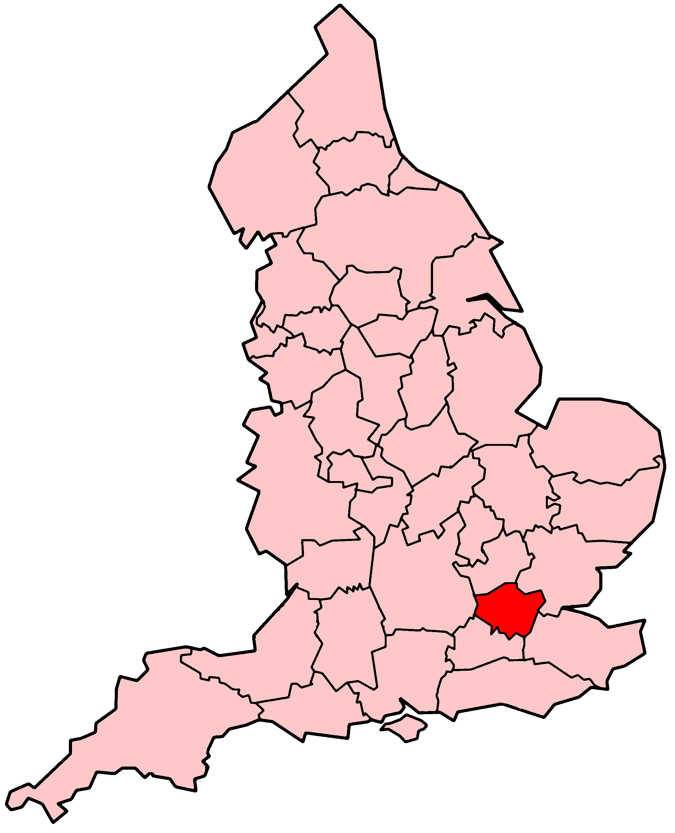 Metropolitan